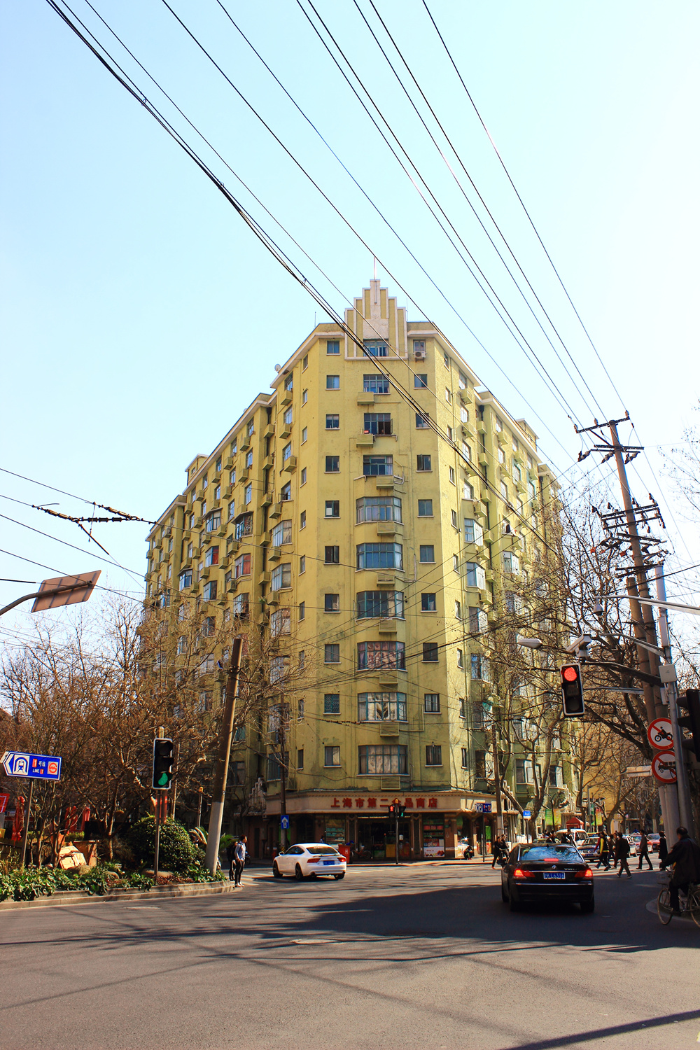 西湖公寓，淮海路